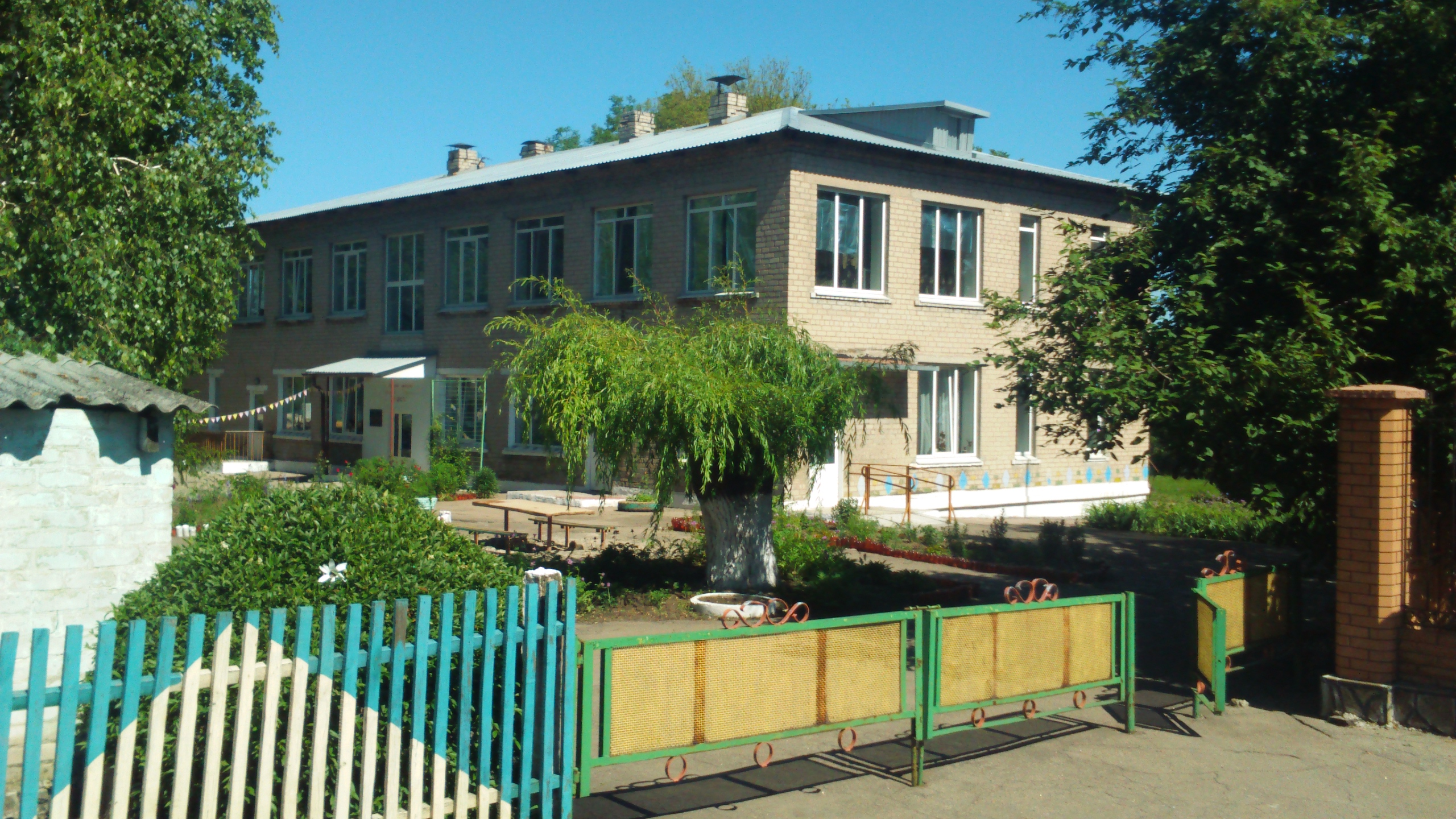 Світле — селище в Україні, Добропільському районі Донецької області, над річкою Водяна.